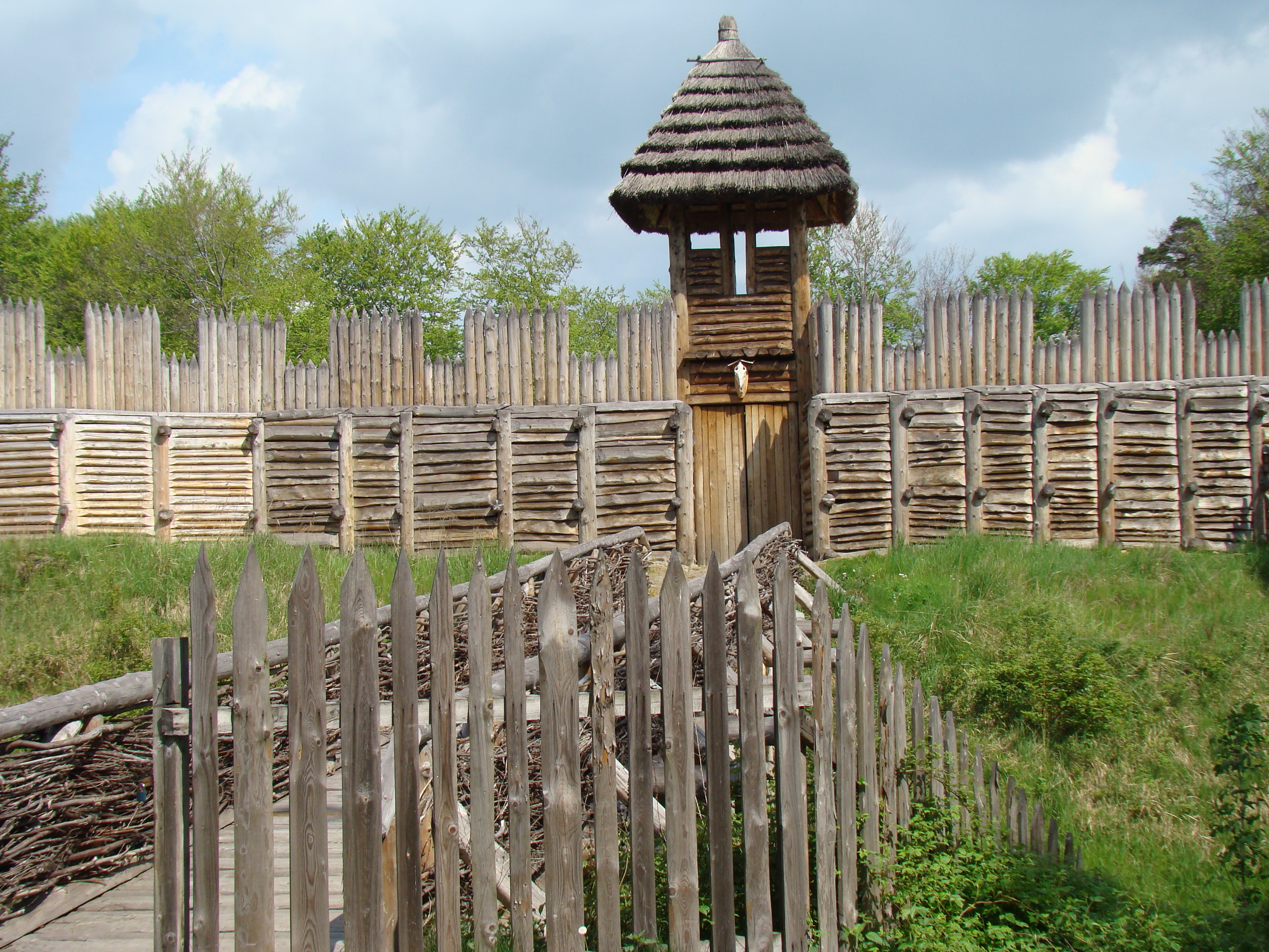 Archeopark Podobora in Chotěbuz (Kocobędz)